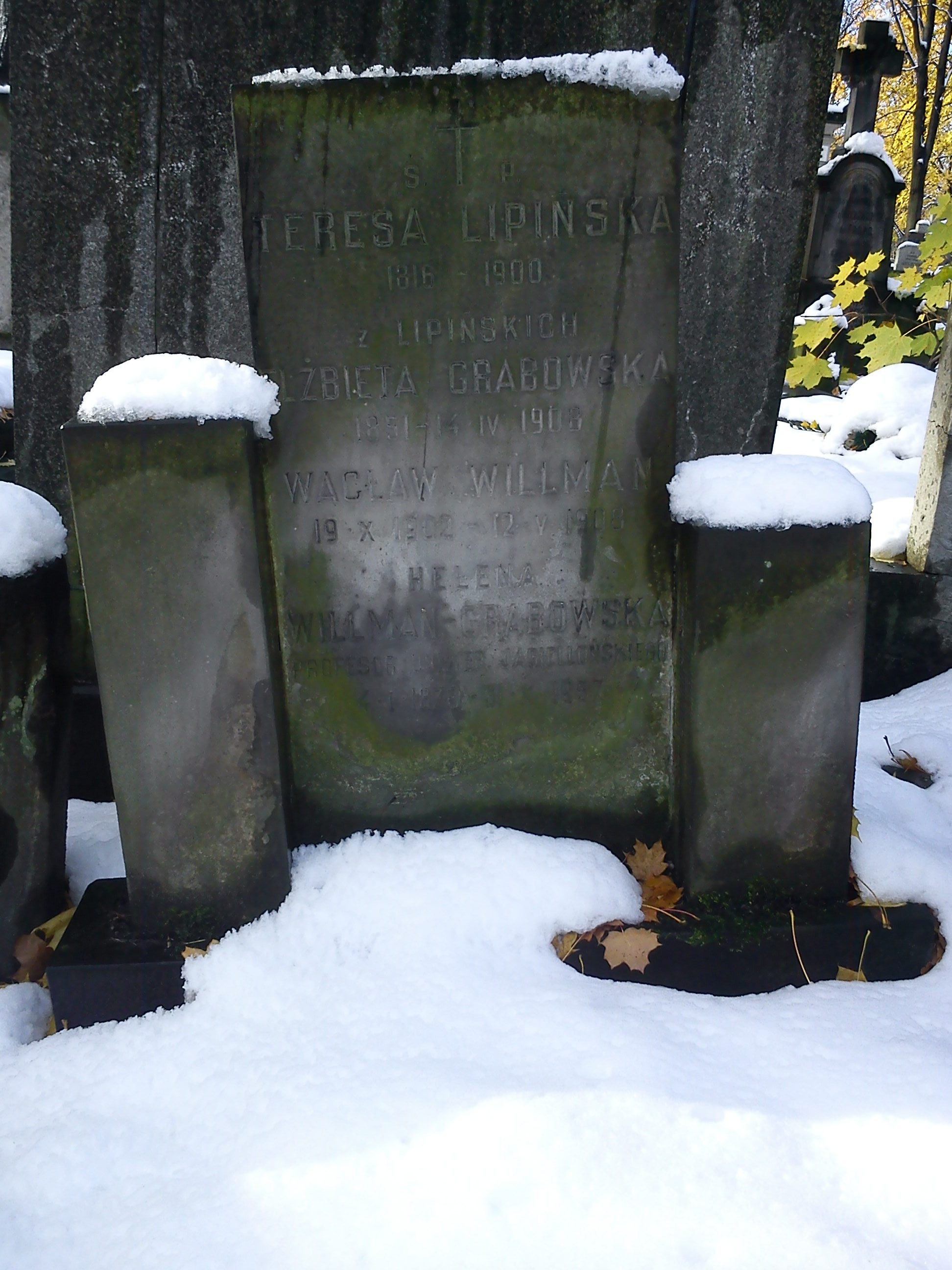 Nagrobek w miejscu pochówku prof. Heleny Willman-Grabowskiej oraz jej matki, babki i syna na cmentarzu Powązkowskim w Warszawie (kwatera K, rząd 3, grób 22)